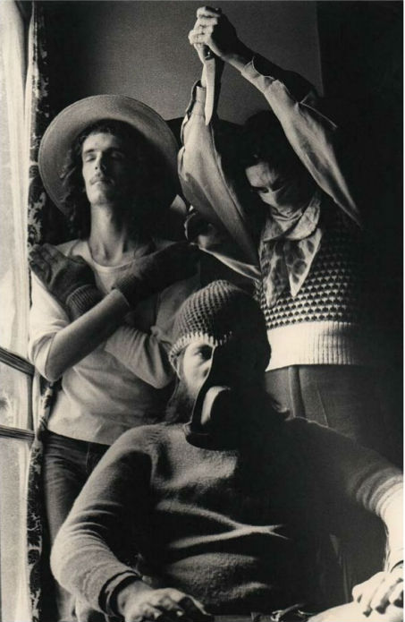 Invisible